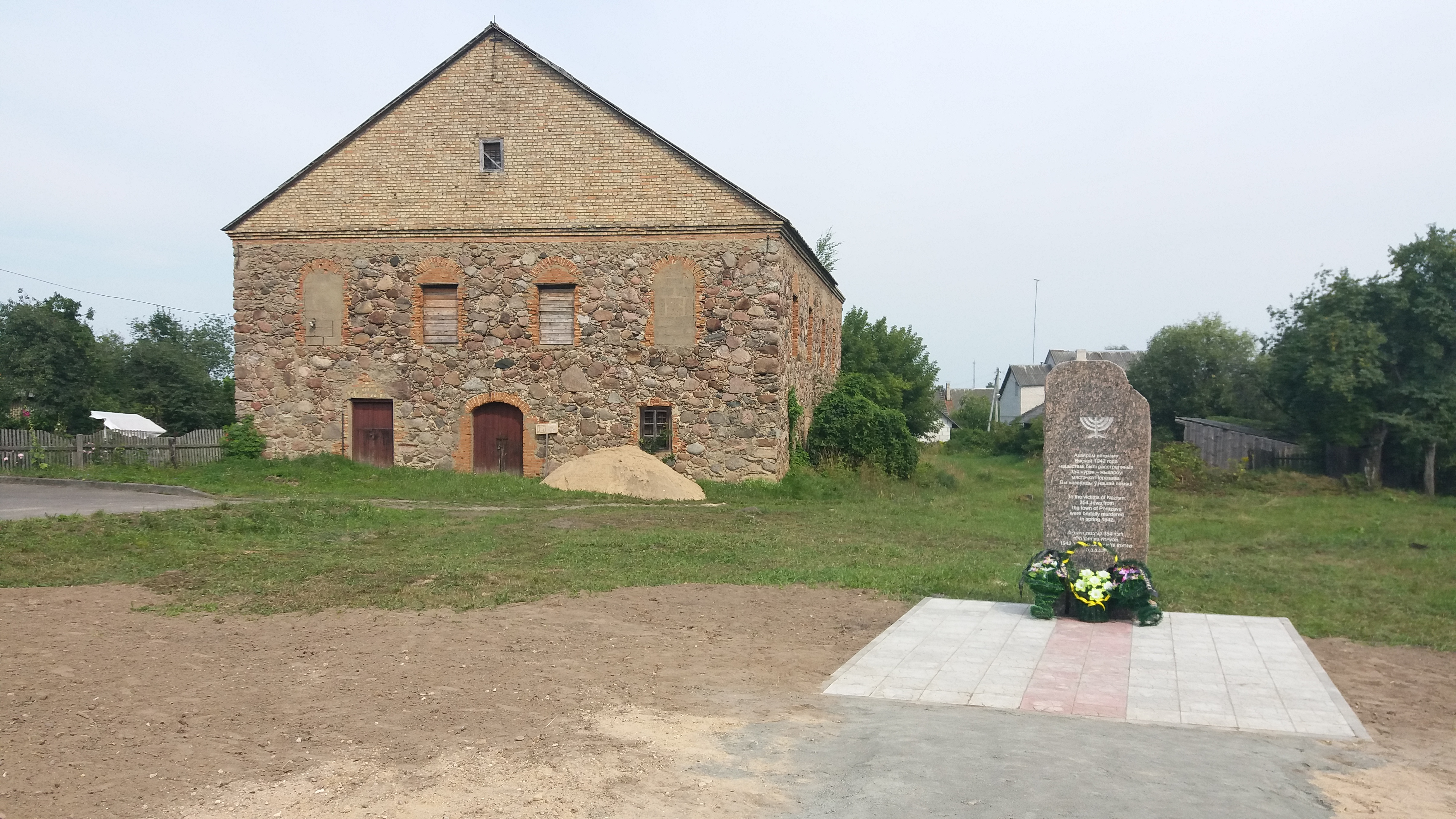 Памятник евреям - узникам гетто в поселке Порозово Свислочского района Гродненской области, убитым нацистами весной 1942 года.